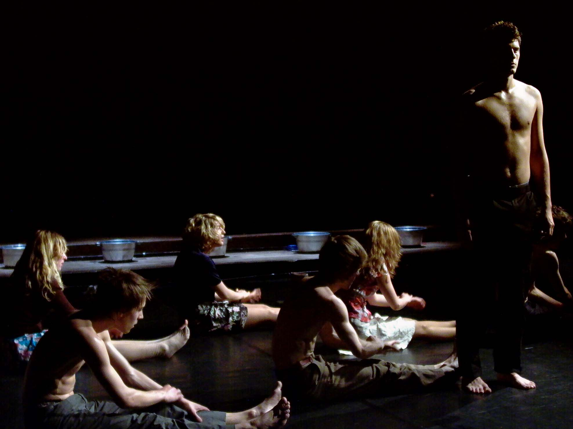 Szene aus dem Theaterstück ADIEU von Ives Thuwis (aufgeführt am Forum Freies Theater)